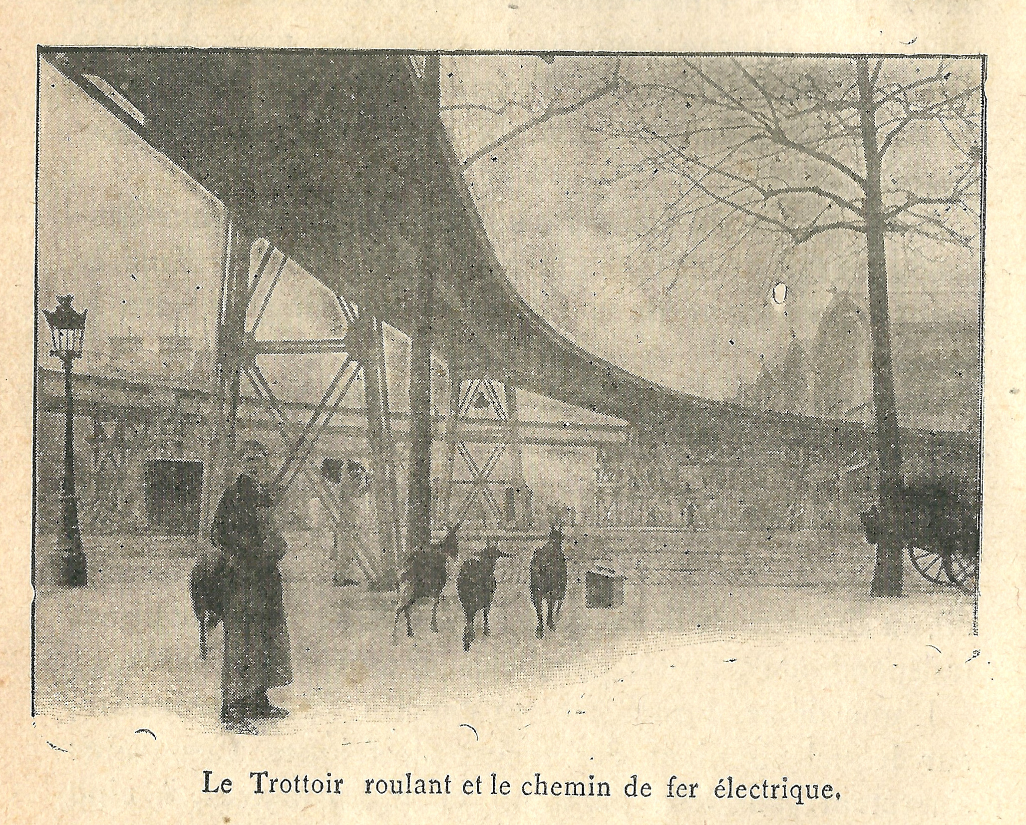 Une des illustrations du Guide remboursable de l'Expo 1900